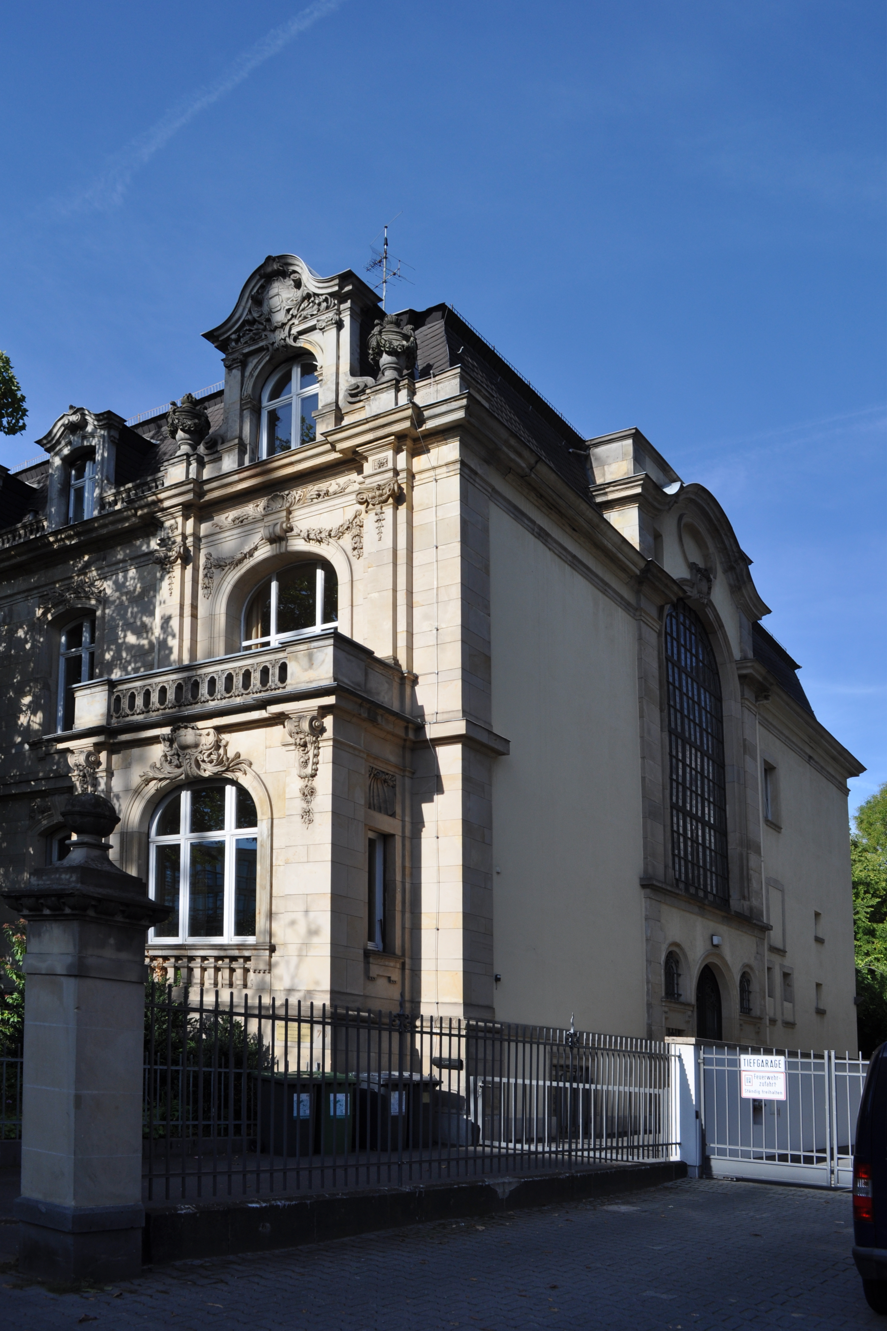 Denkmalgeschütztes Haus Bockenheimer Landstraße 76 in Frankfurt. Neobarockes Wohnhaus mit teilweise skulptierter Werksteinfassade und Ziergiebeln am Seitenrisalit. Es gibt einen Buchtitel: Das Haus Bockenheimer Landstraße Nr. 76 von Ilse Wohlenberg von Fischer Rita G. (Dezember 1999); dies Gebäude wird zurzeit als Studienkolleg zum Spracherwerb für ausländische Studierende genutzt.